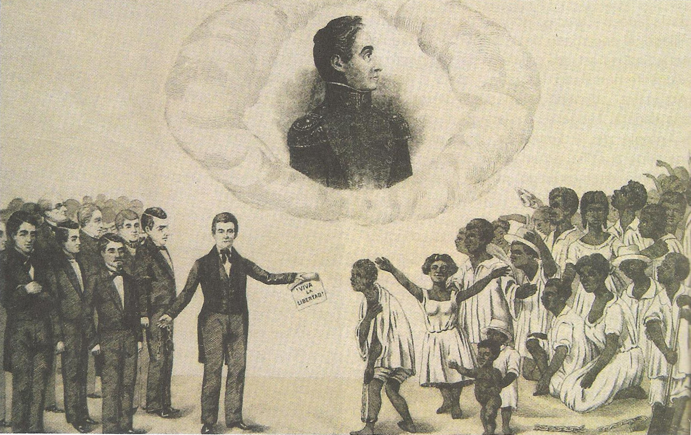 Grabado que alegoriza la abolición de la esclavitud. Litografía y tipografía del comercio, Caracas.